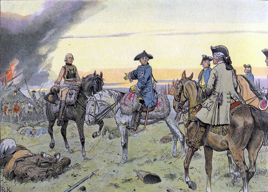 Frédéric II complimente le général Seydlitz en présence de son état-major à la bataille de Zorndorf, le 25 août 1758.